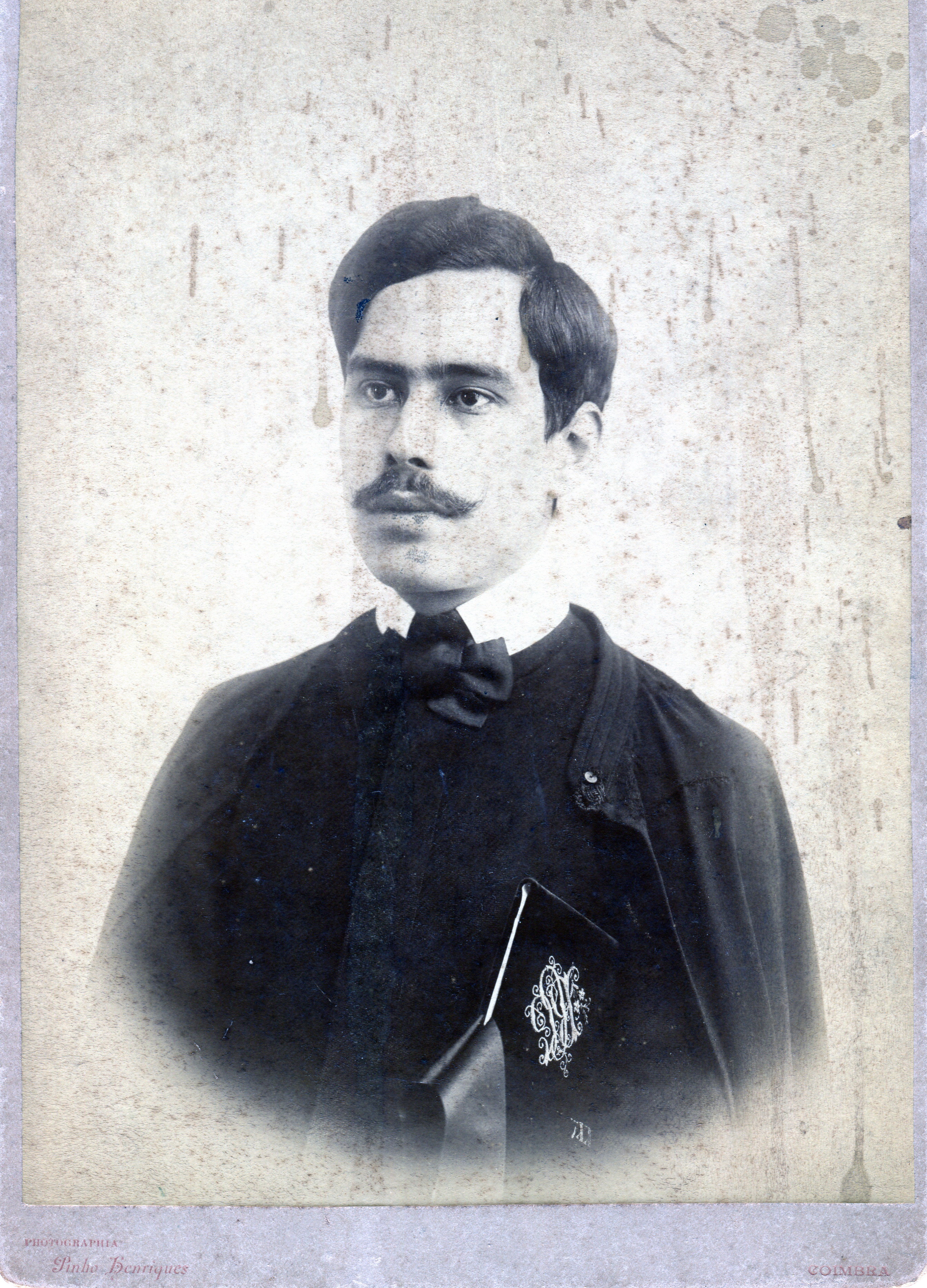 Com traje académico (Coimbra, Maio 1900)